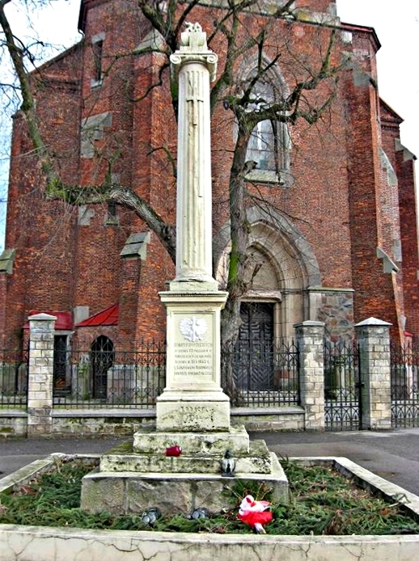 Pomnik powstańców styczniowych w Olbierzowicach. Postawiony na placu przed kościołem parafialnym w 1930, odnowiony w 2008